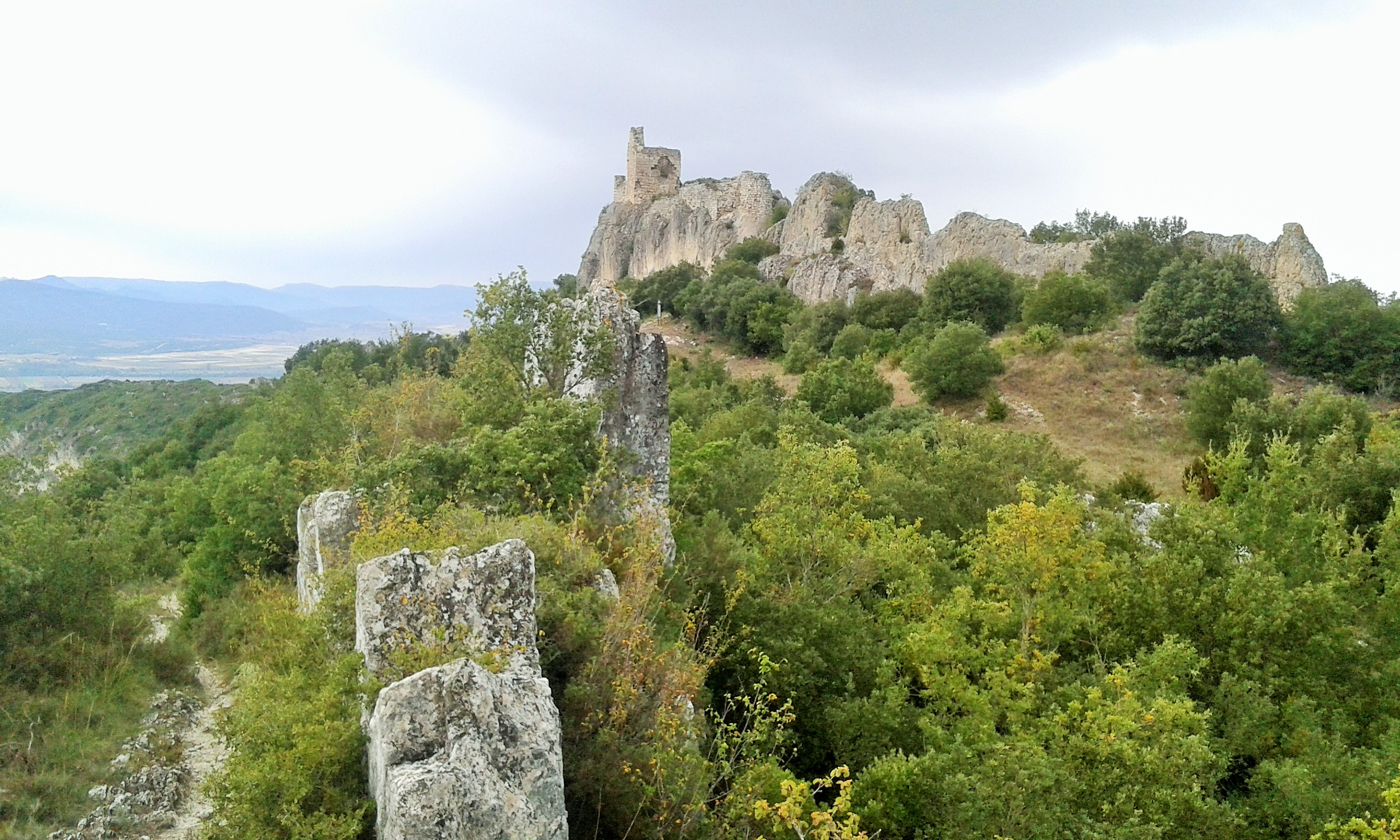 Zabalateko gaztelua 2015-10-04